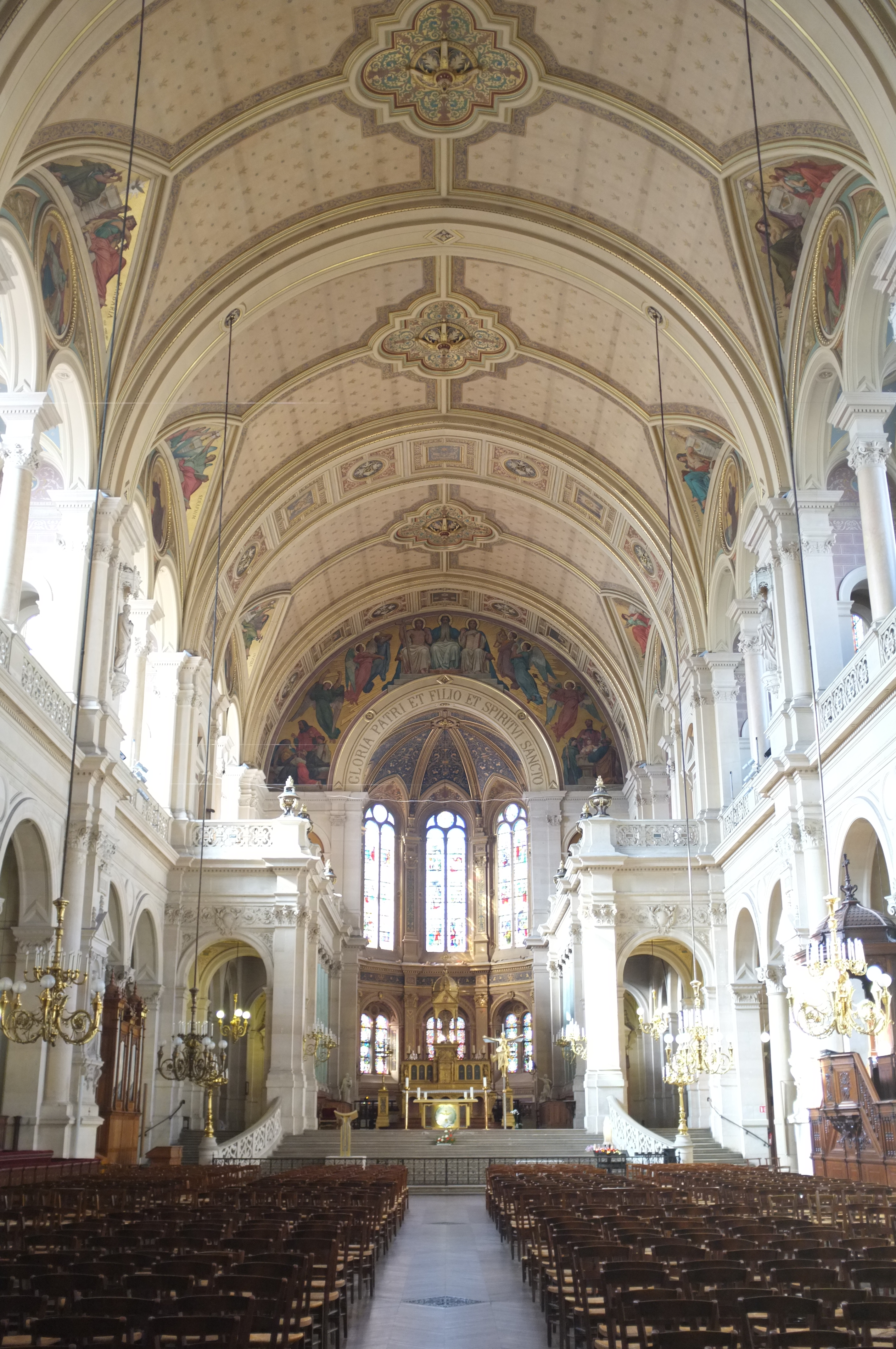 intérieur de l'Église de la Sainte-Trinité (Paris) vue de l'entrée principale .